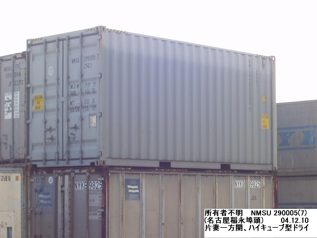 関連資料画像。 詳しくは焼付け解説を参照下さい。